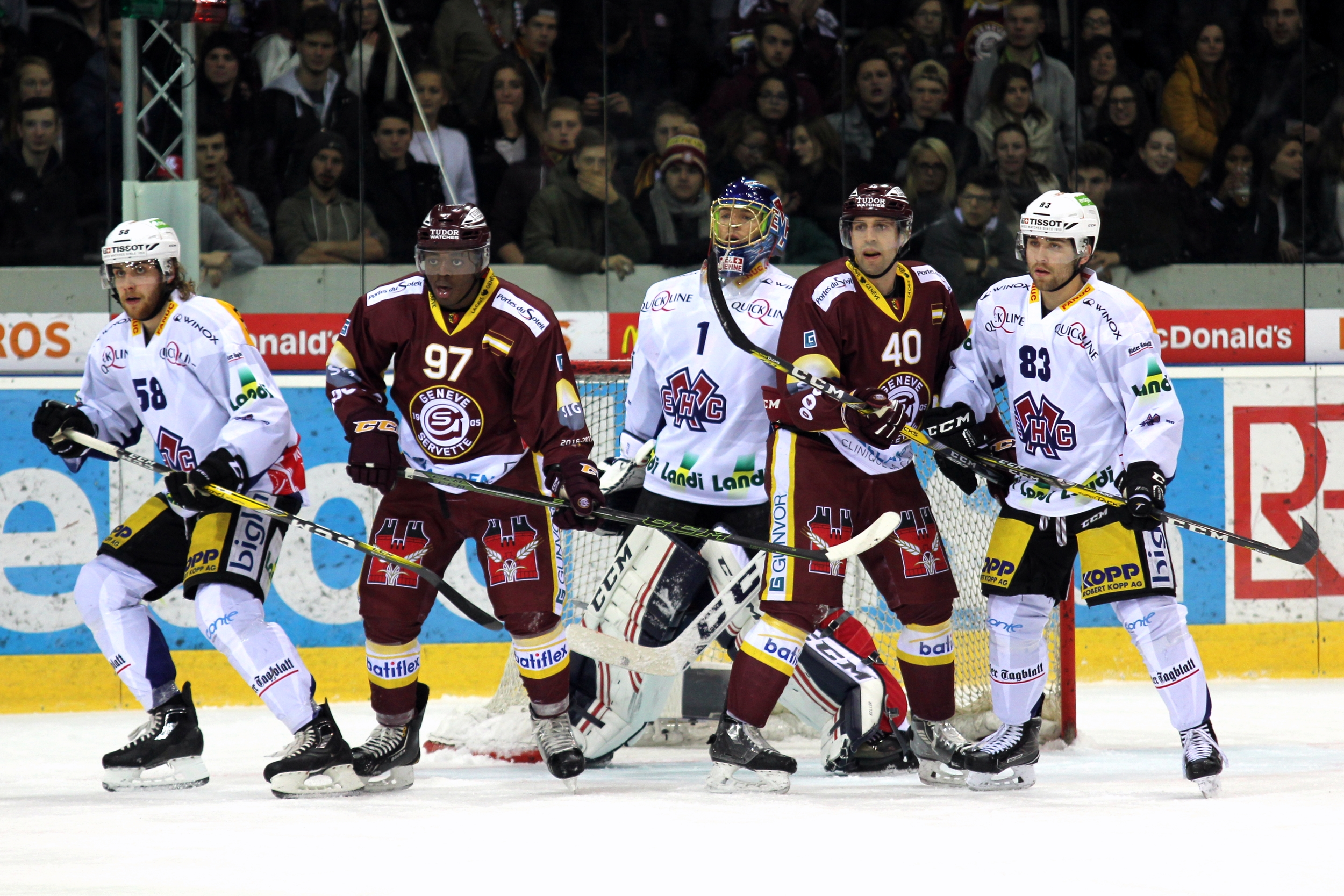 Valentin Lüthi (B 58), Auguste Impose (G 97), Jonas Hiller (B 1), Daniel Rubin (G 40), Mauro Dufner (B 83).